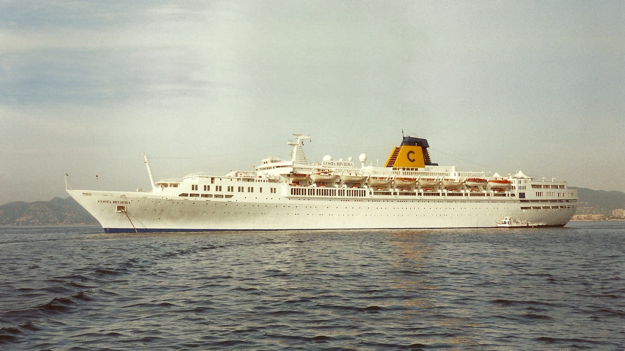 Reede Cannes Frankreich